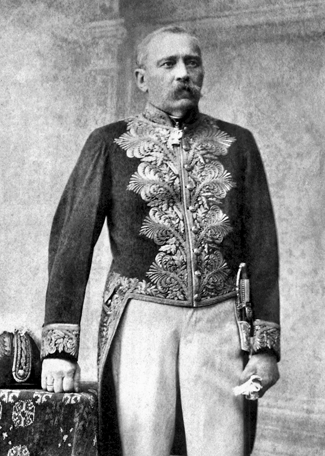 Alecu baron Wassilko de Serecki, 1884